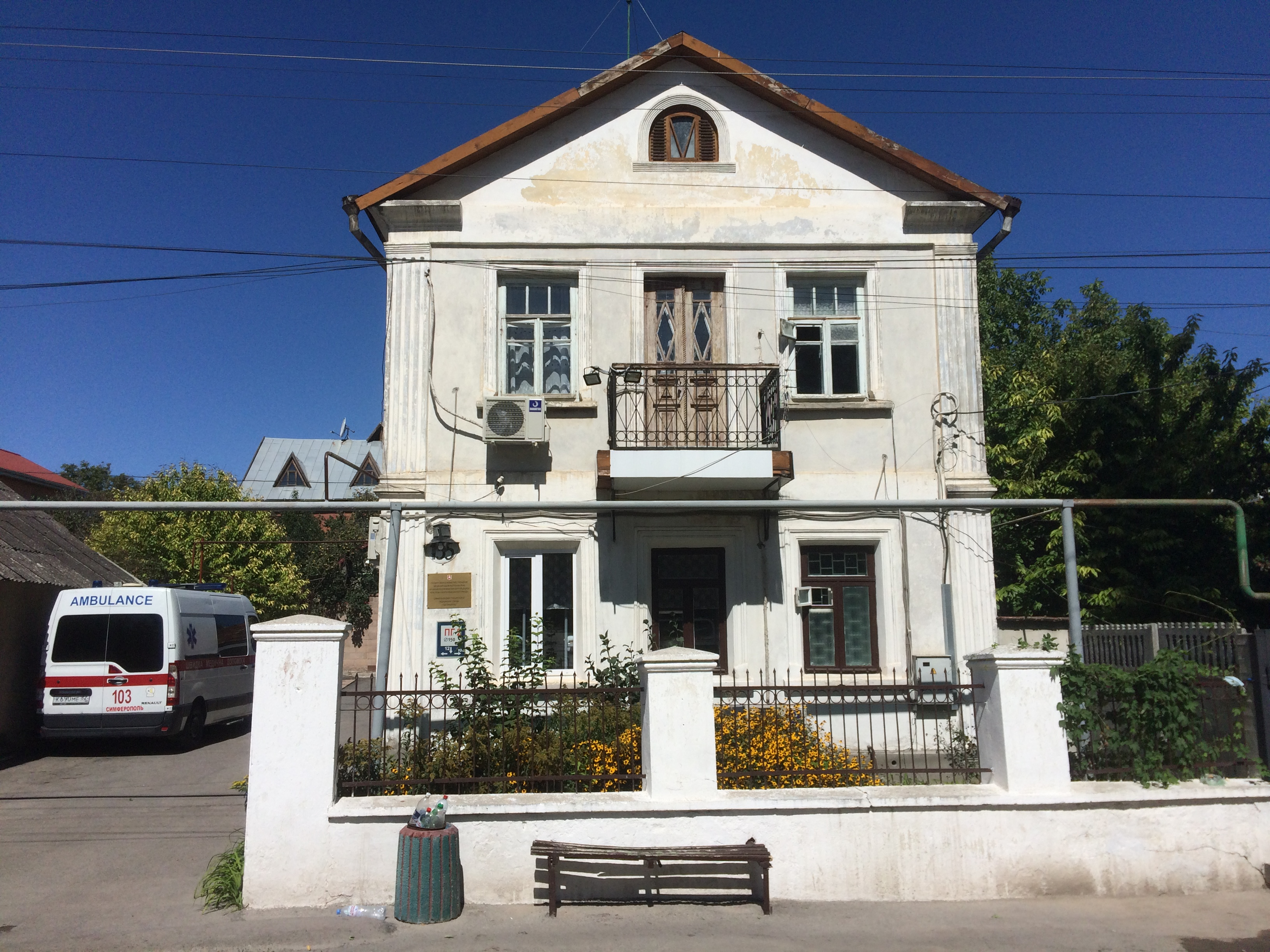 Станция скорой помощи по ул. Севастопольская, 155 в г. Симферополь